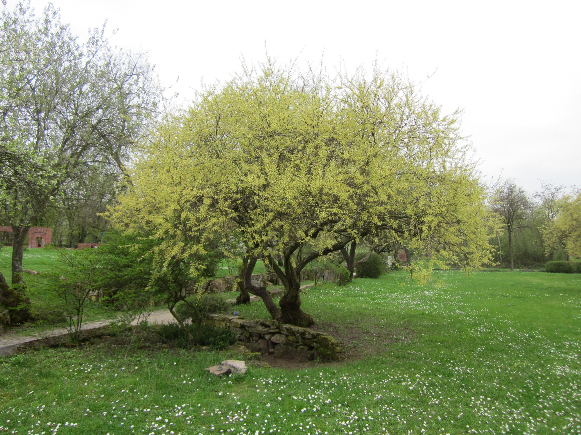 Silberweide (Salix alba) im Bürgerpark Saarbrücken